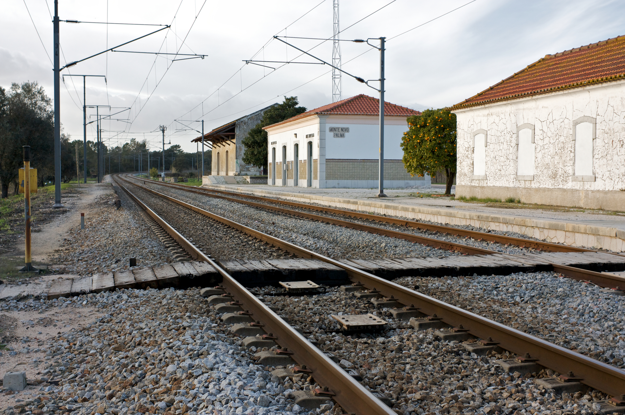 Tipo: ES Estação Satélite Local: Monte Novo Linha do Sul, PK 64 Data e hora: 14 de Janeiro de 2010 16h38